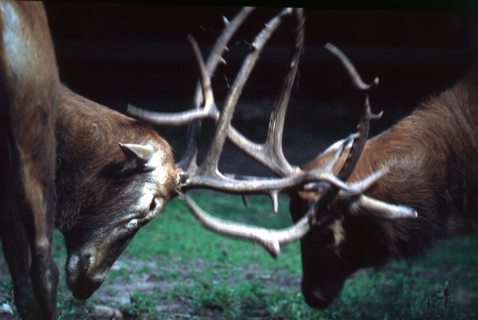 Elaphurus davidianus (Milne-Edwards), 1866. Ger:Pater-David-Hirsch, Milu.